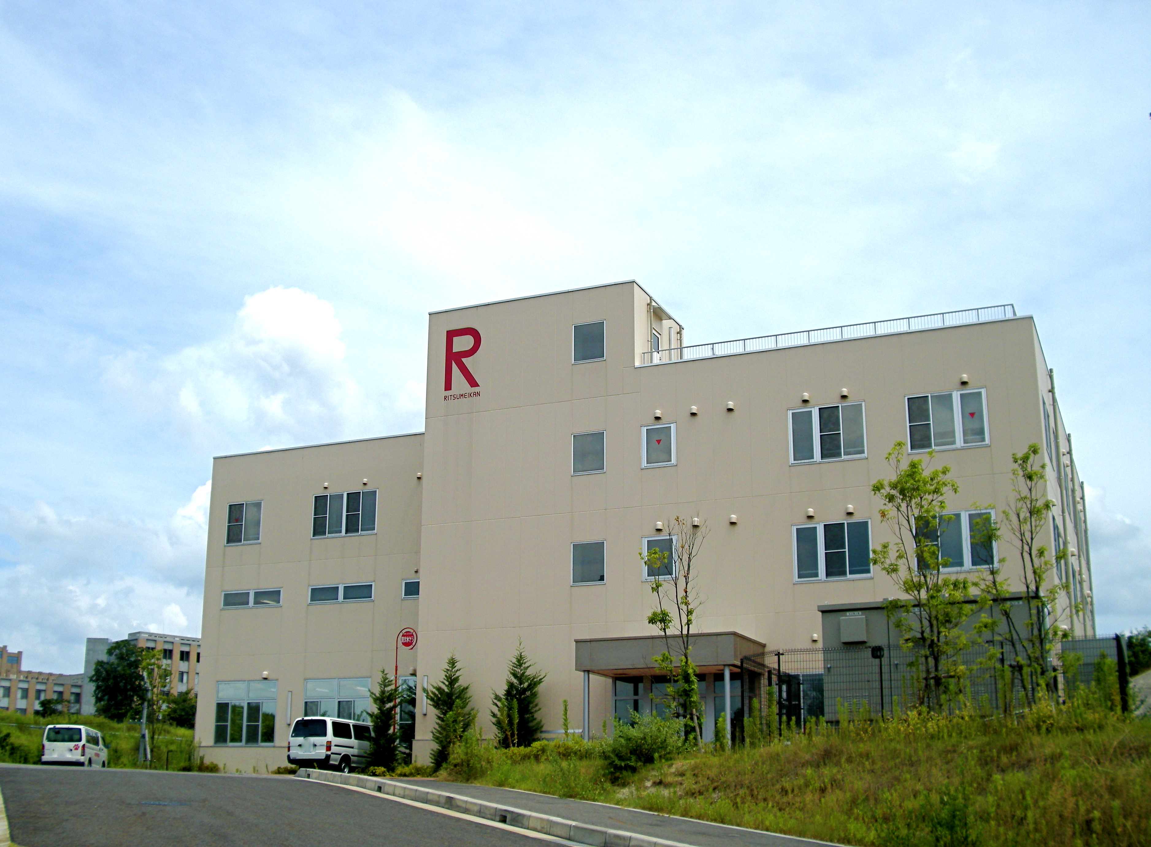 立命館大学 BKC